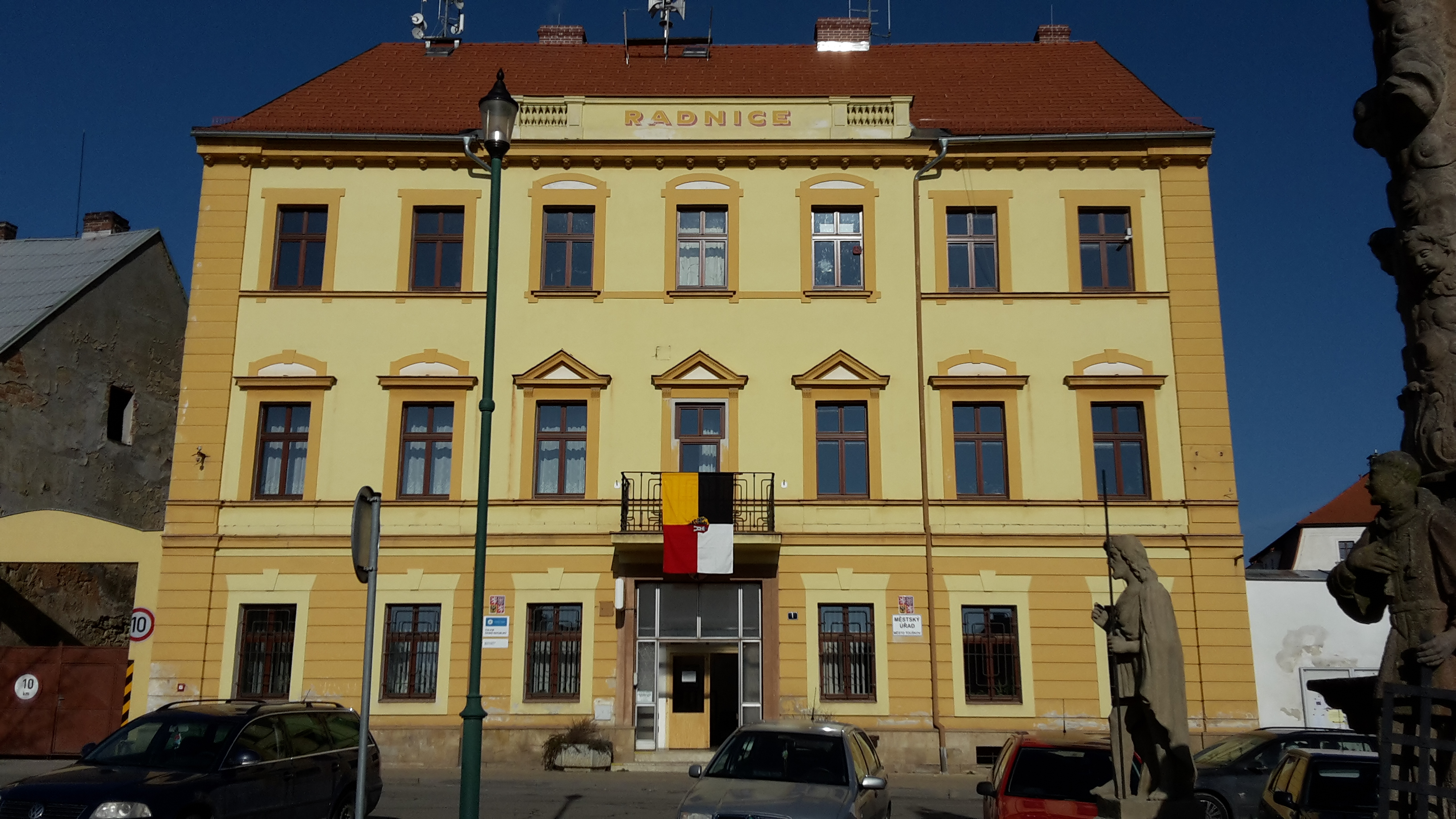 Sídlo MěÚ Město Touškov - Touškovská radnice